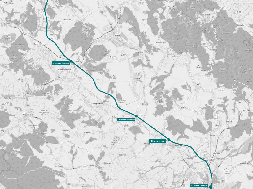 Schemat przebiegu linii kolejowej Kłodzko-Wałbrzych